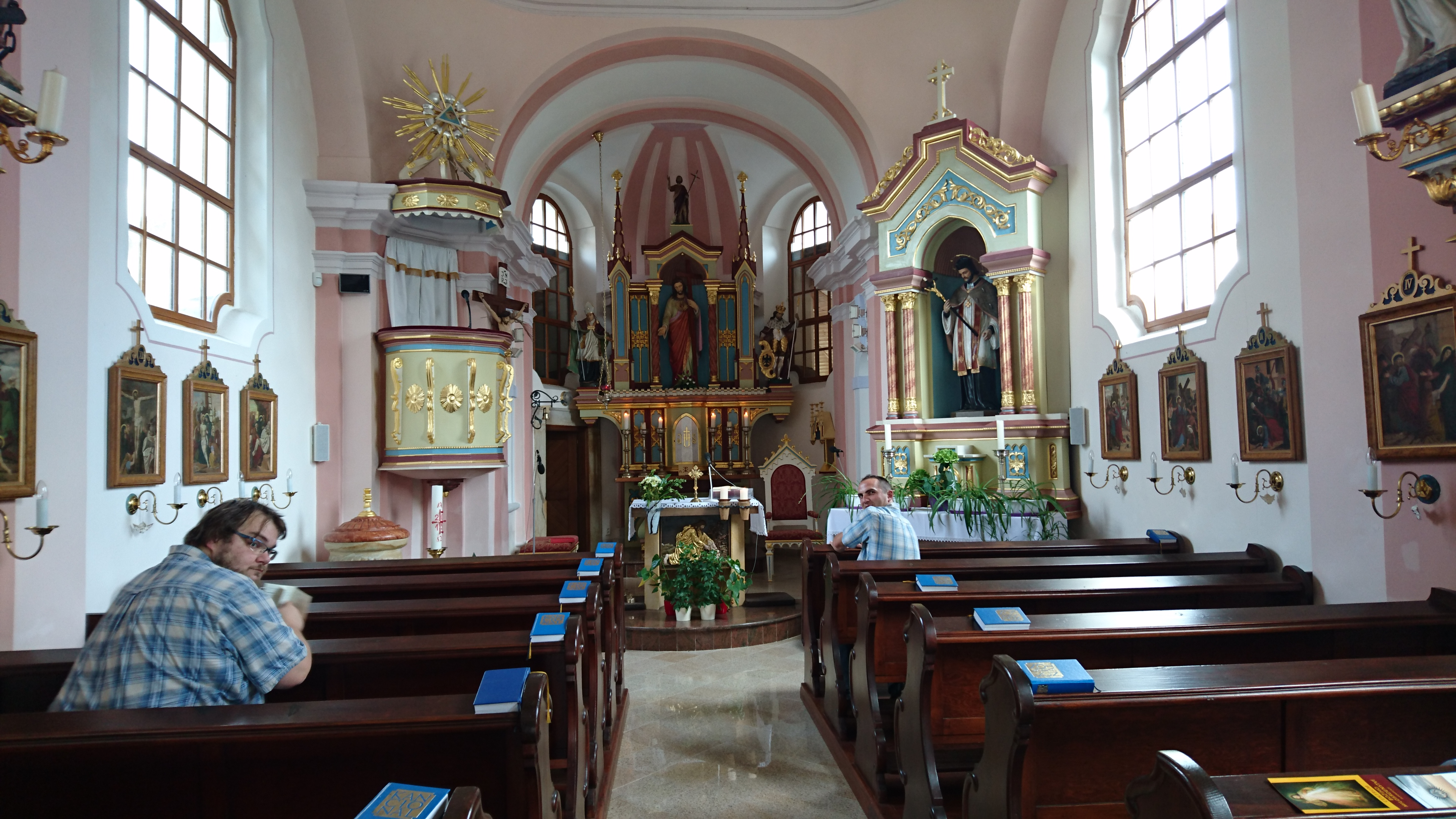 Kostel Narození sv. Jana Křtitelev Horních Habarticích